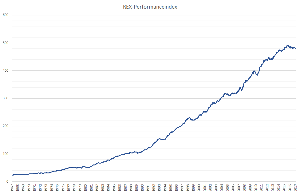 REX-Performanceindex Stand 31.12.2017, Lineare Skala, Quelle: Deutsche Bundesbank